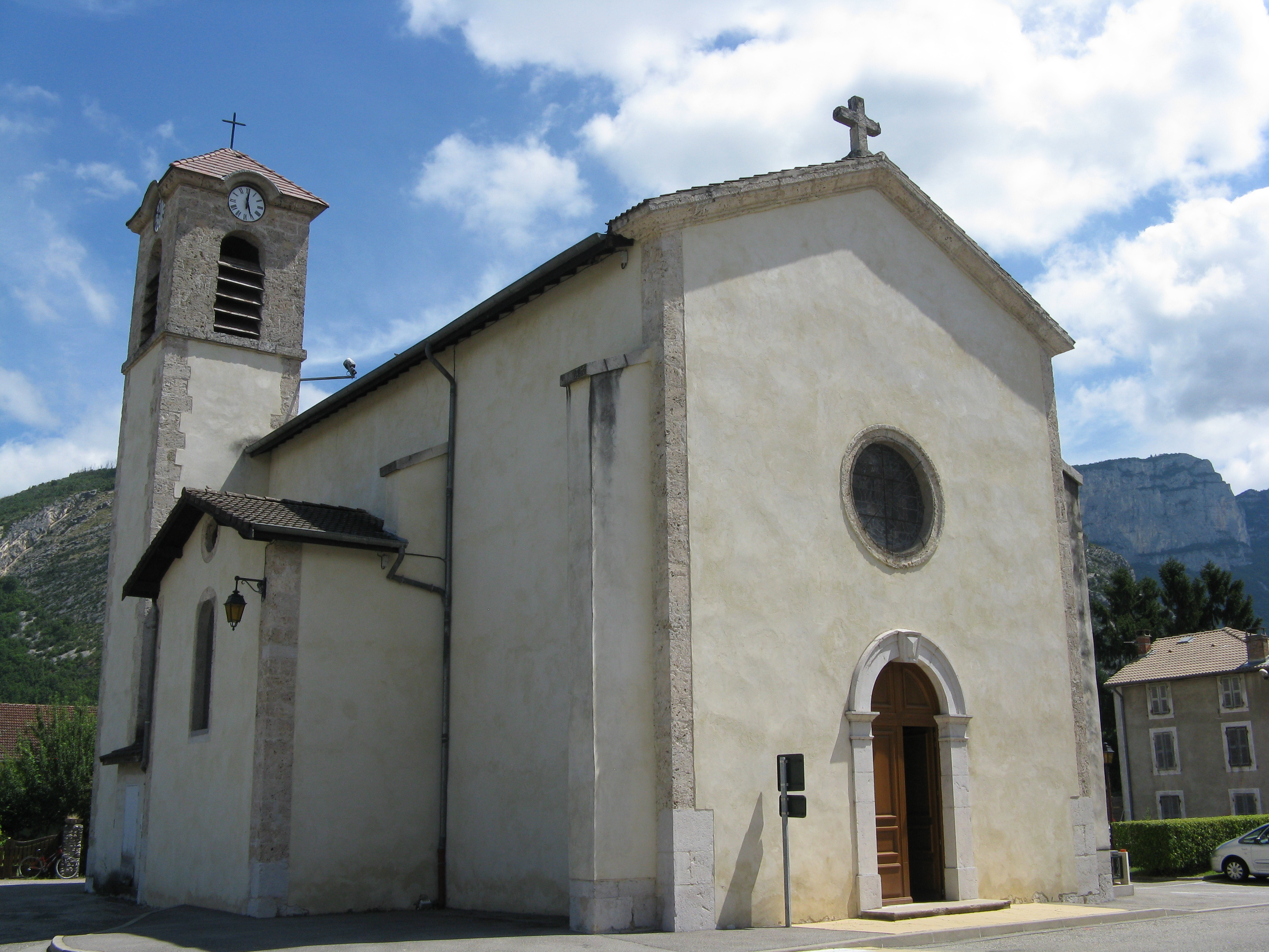 Sainte Eulalie en Royans - Eglise